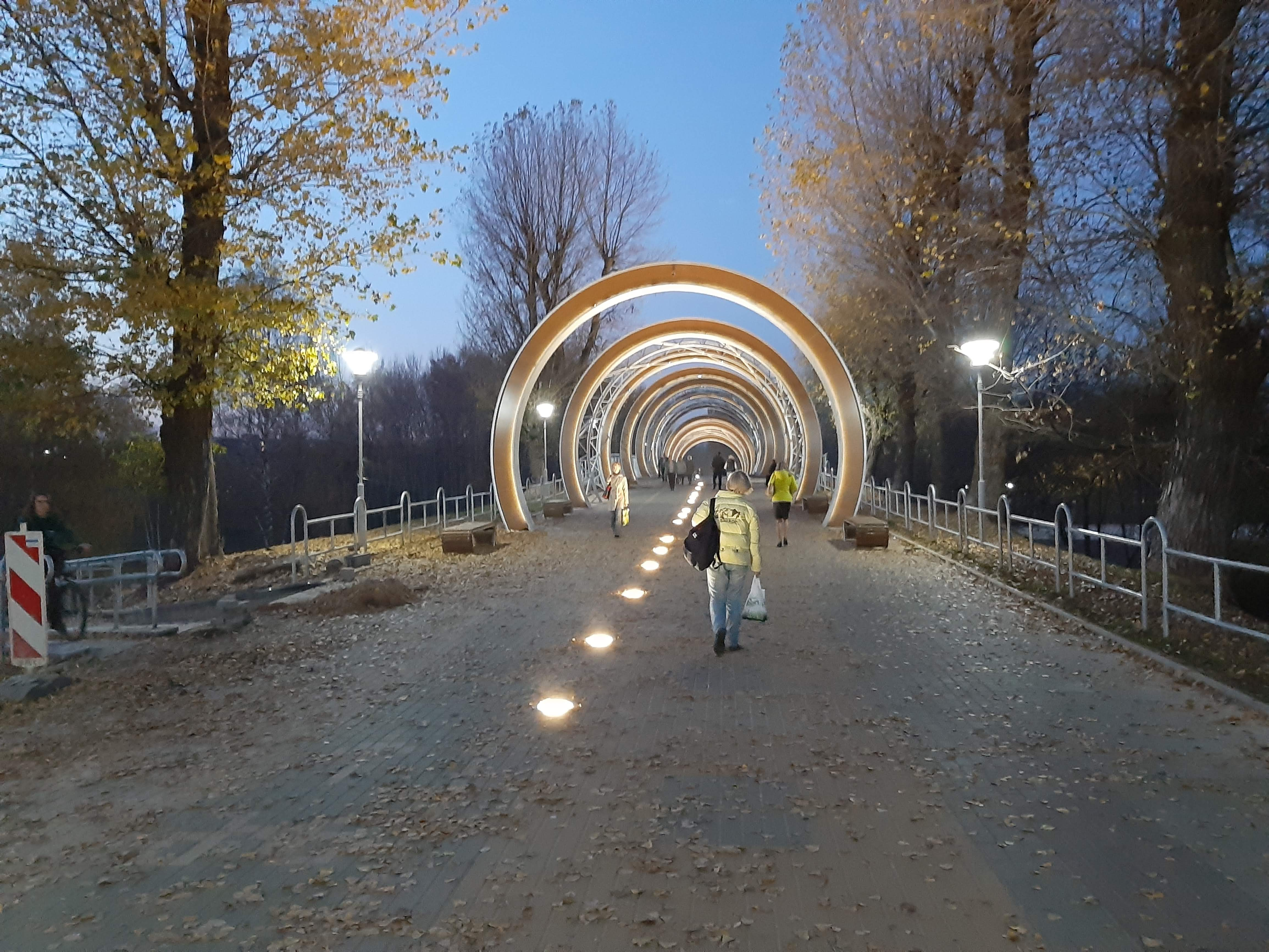 Восень у Магілёве